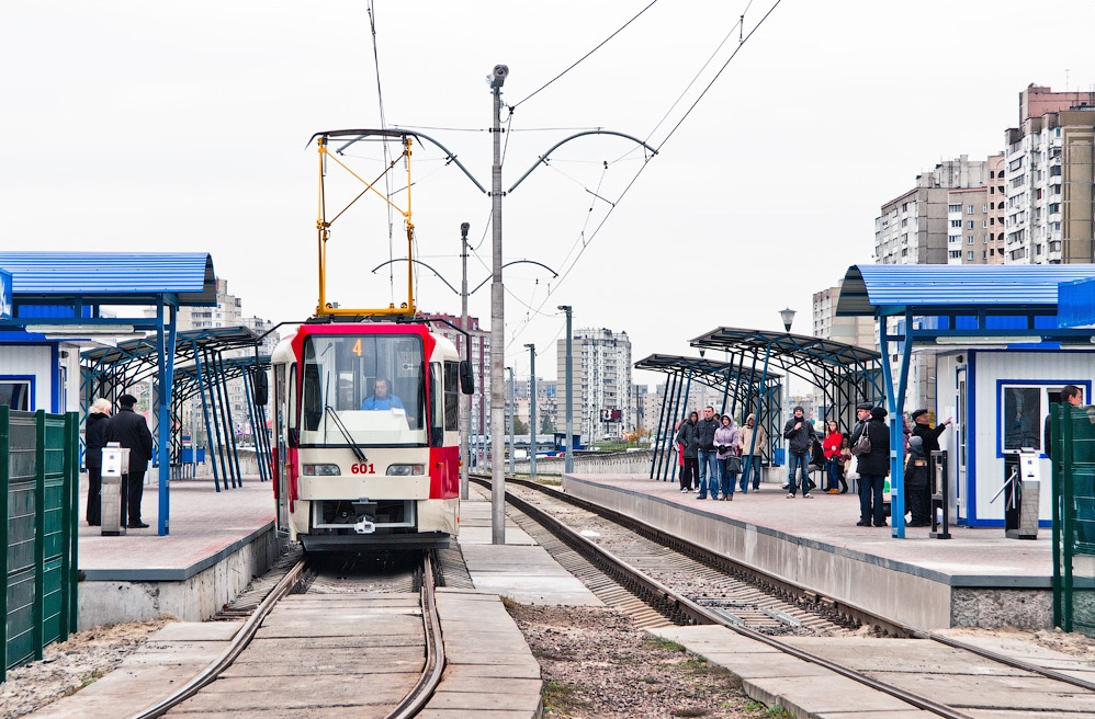 Станція «Милославська» Київського швидкісного трамваю